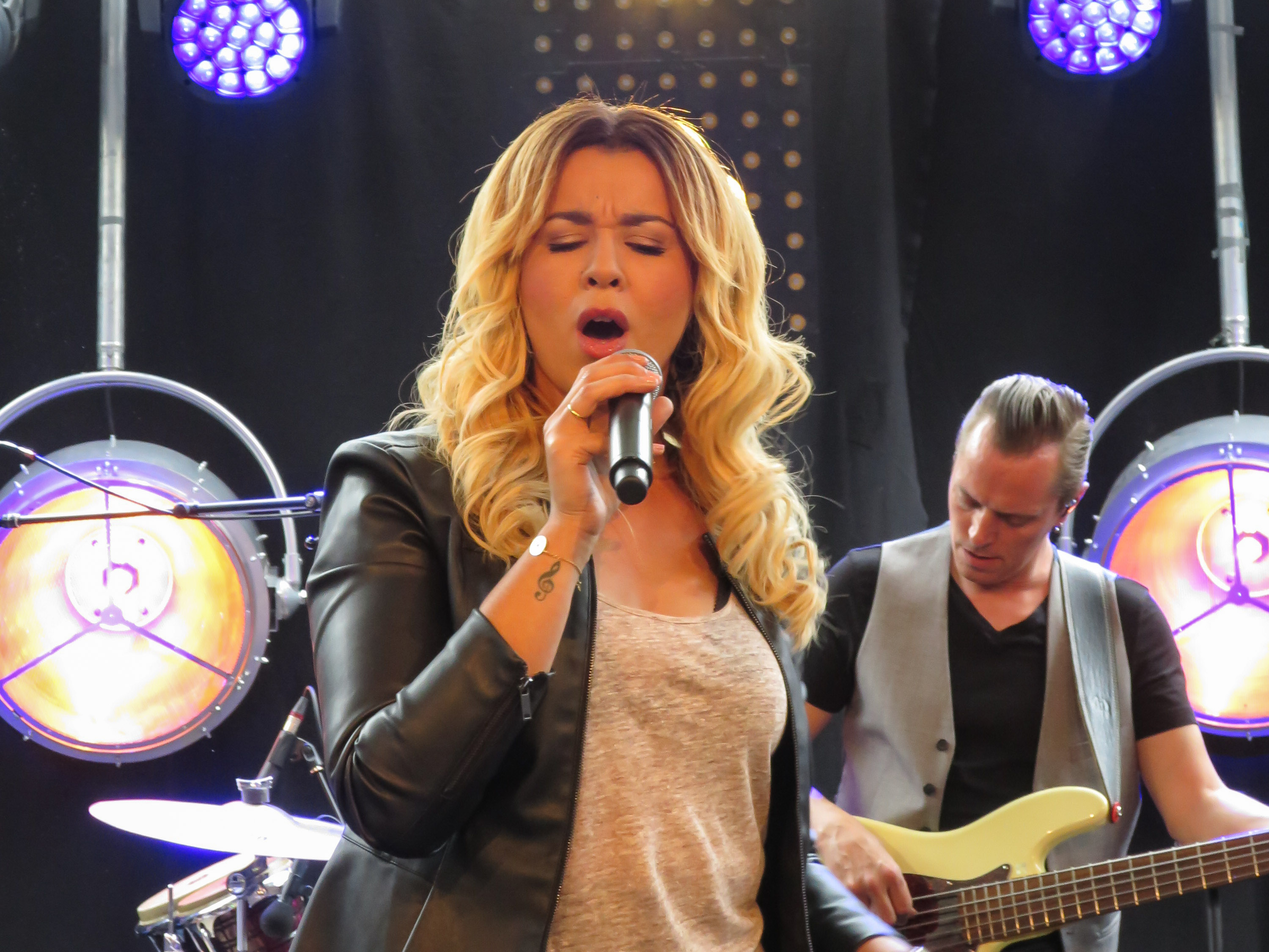 Chimène Badi en concert au centre commercial de Villabé A6 le 11 juin 2016 (Villabé, Essonne, France)